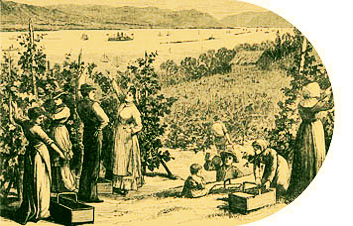 La récolte du raisin sur hautain au Québec à la fin du XIXe siècle.Version tronquée et réduite d'une gravure légendée « La récolte du raisin » publiée dans L’opinion publique, vol 10, no 44, p. 519 (30 octobre 1879) [1].